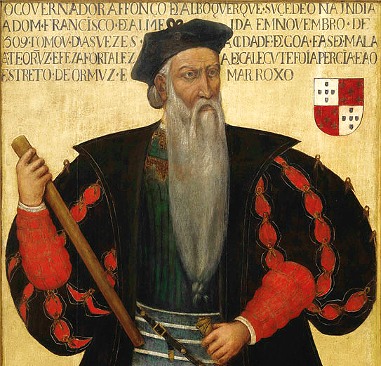 "Retrato de Afonso de Albuquerque, Vice-Rei da Índia Portuguesa" (após 1545), por Autor desconhecido. No Museu Nacional de Arte Antiga, em Lisboa.